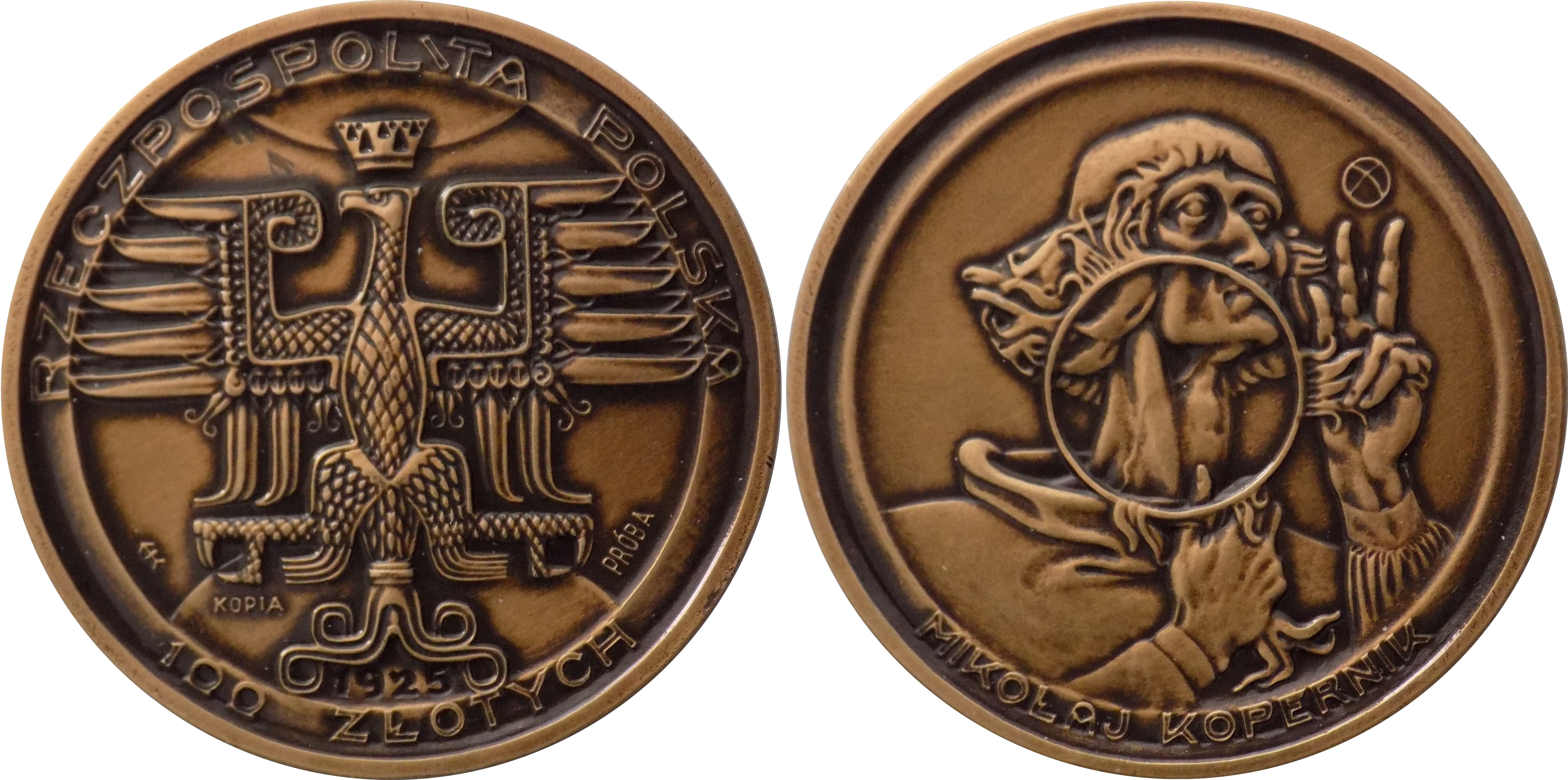 Replika 100 złotych 1925 Mikołaj Kopernik 35 mm brąz